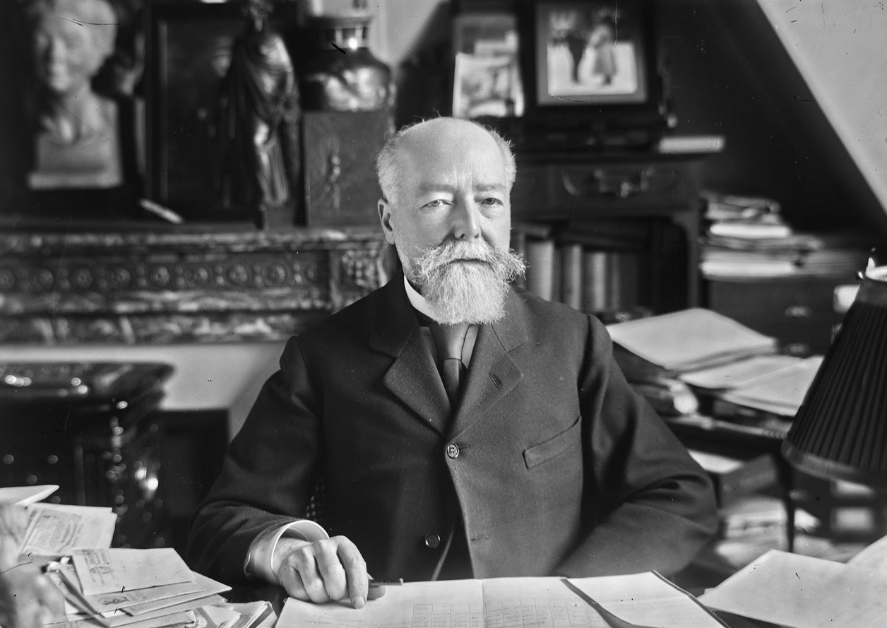 Paul Doumer dans son bureau.